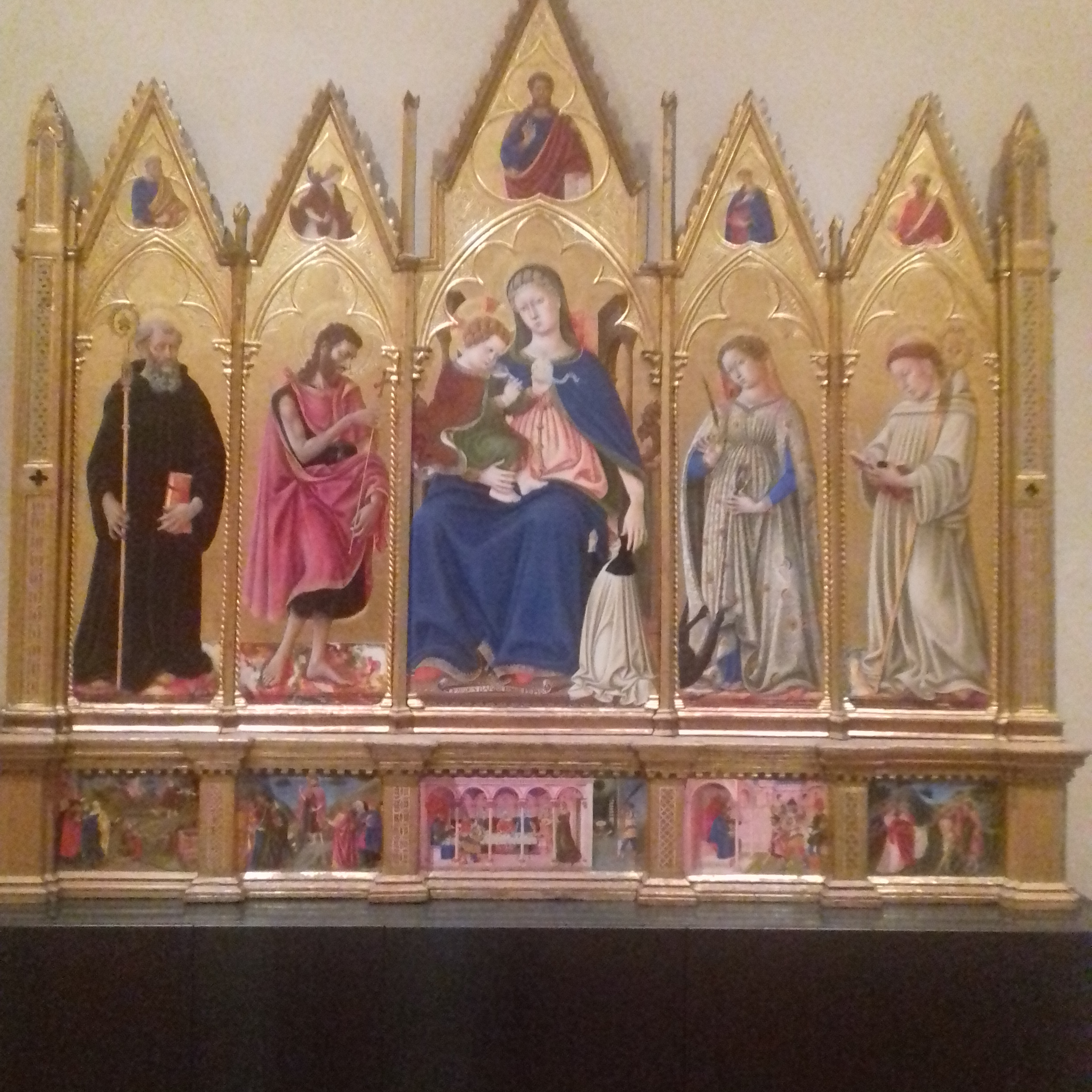 Polittico di Perugia di Domenico di Bartolo